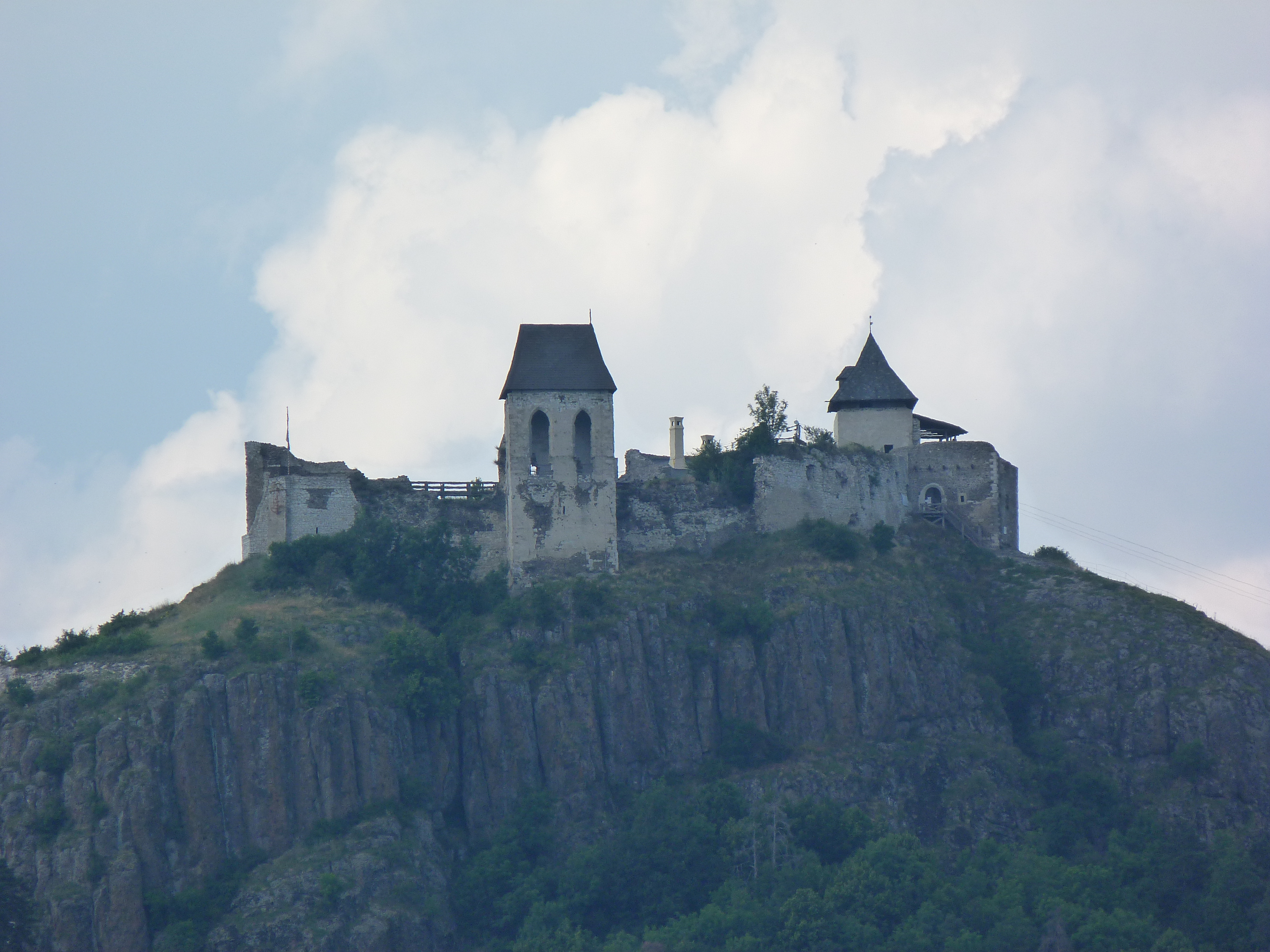 A felvétel 2014. június 19-én szerdán készült Füzér vára. Perényi Péter koronaőr 1536 novemberétől 1527 októberéig Füzér várában őriztette a Szent Koronát.